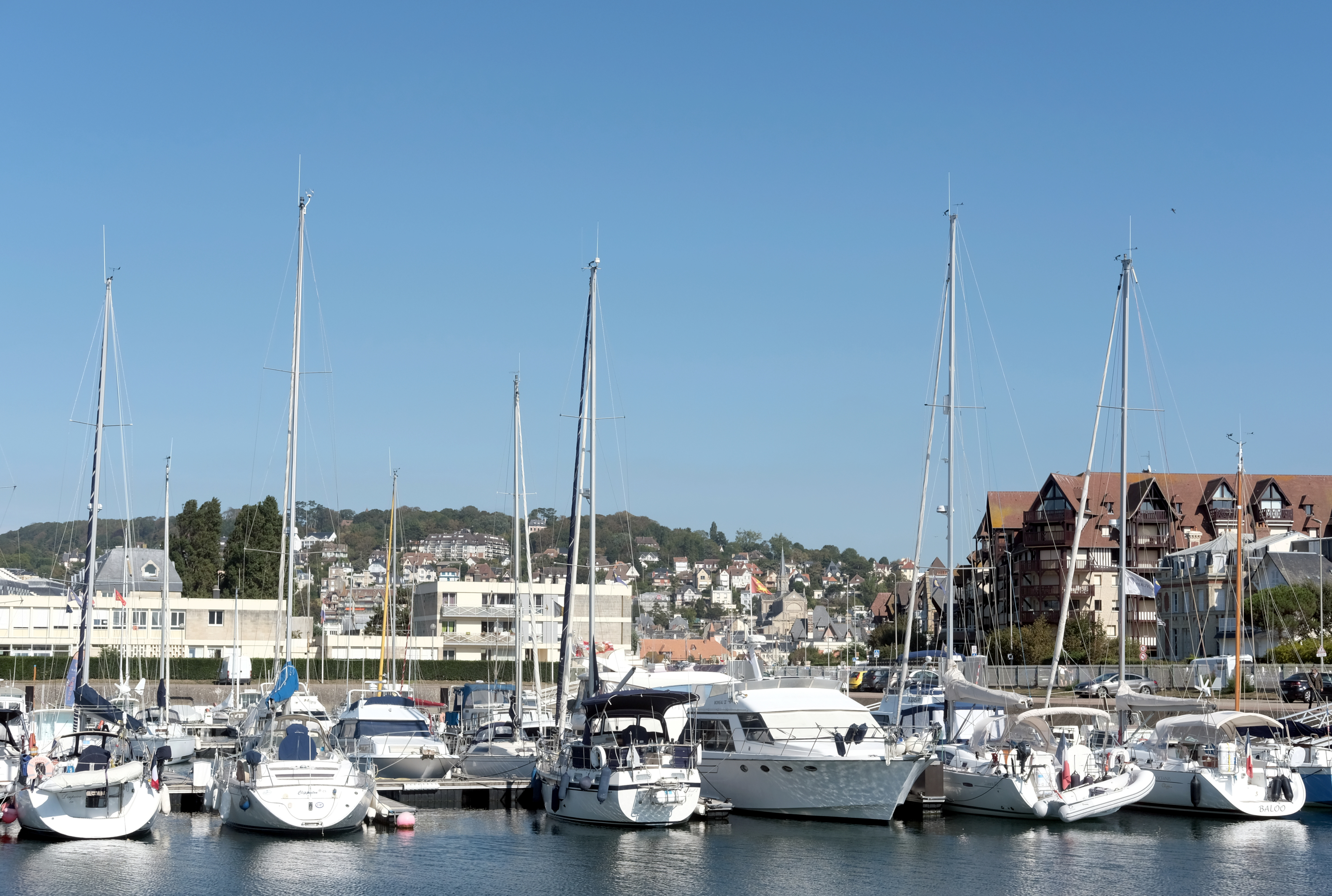 Deauville - Le port